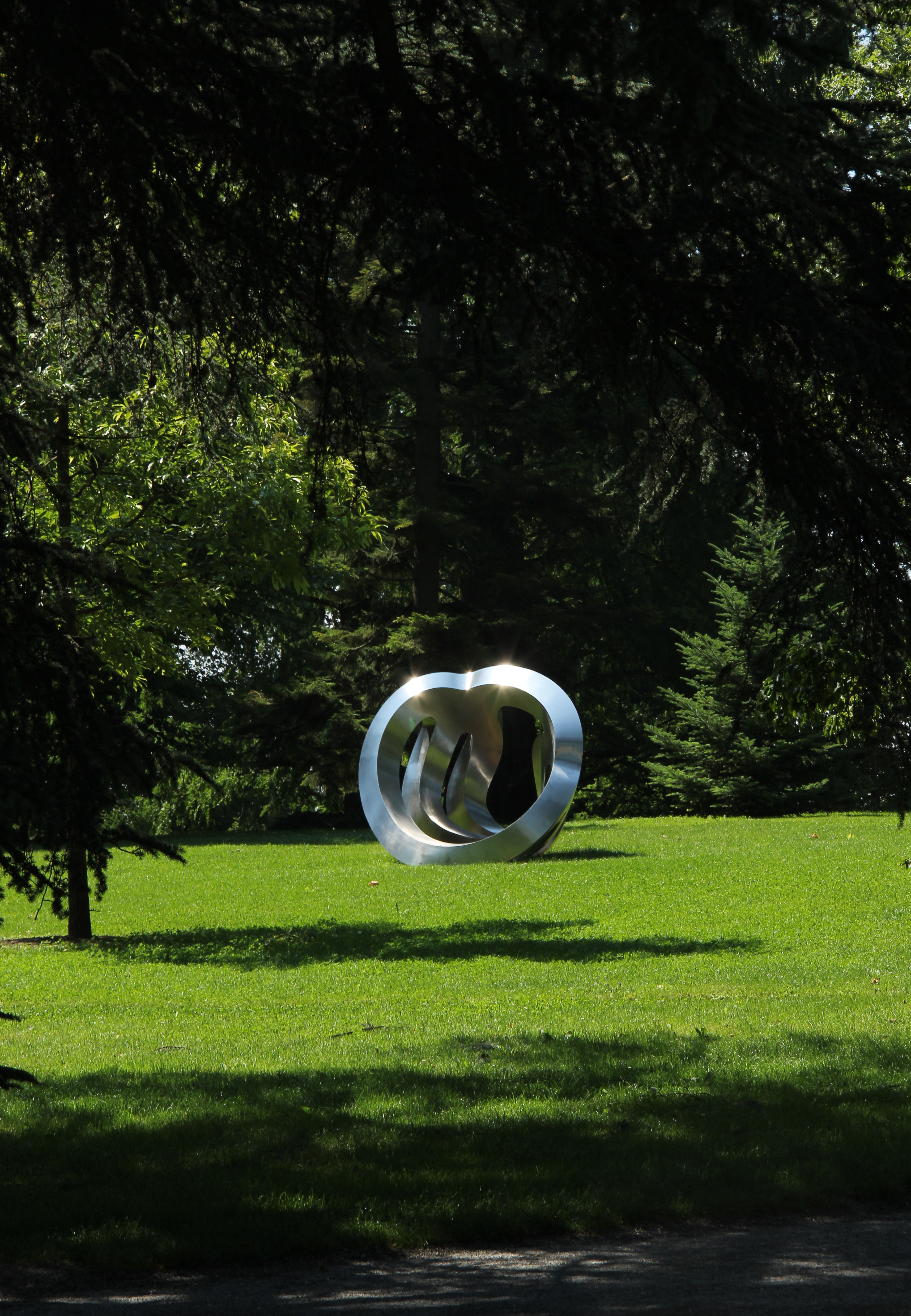 Großskulptur von Carlo Borer im Arboretum der Mainau. 78465 Insel Mainau